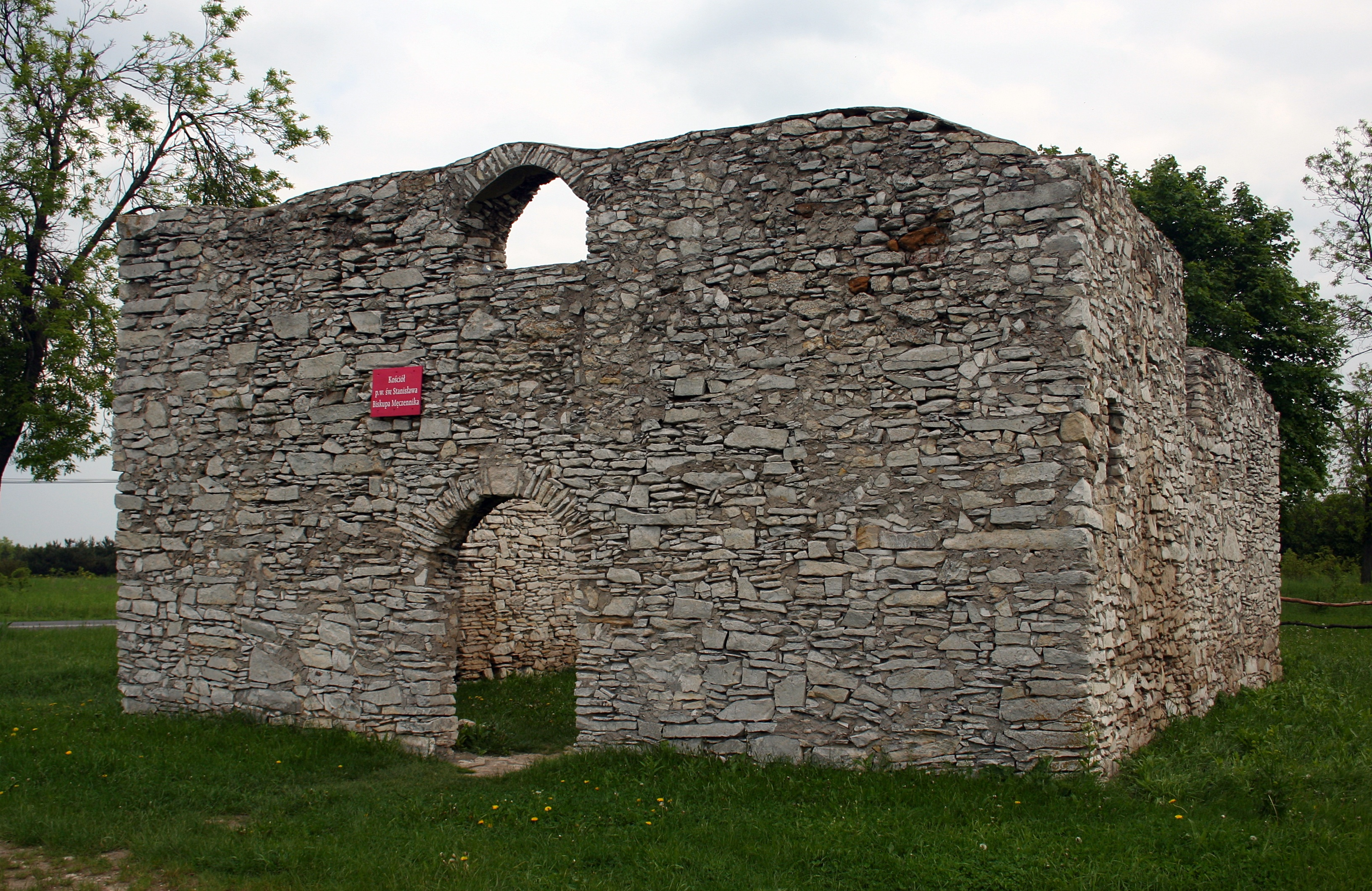 Ruiny kościoła św. Stanisława Męczennika w Żarkach